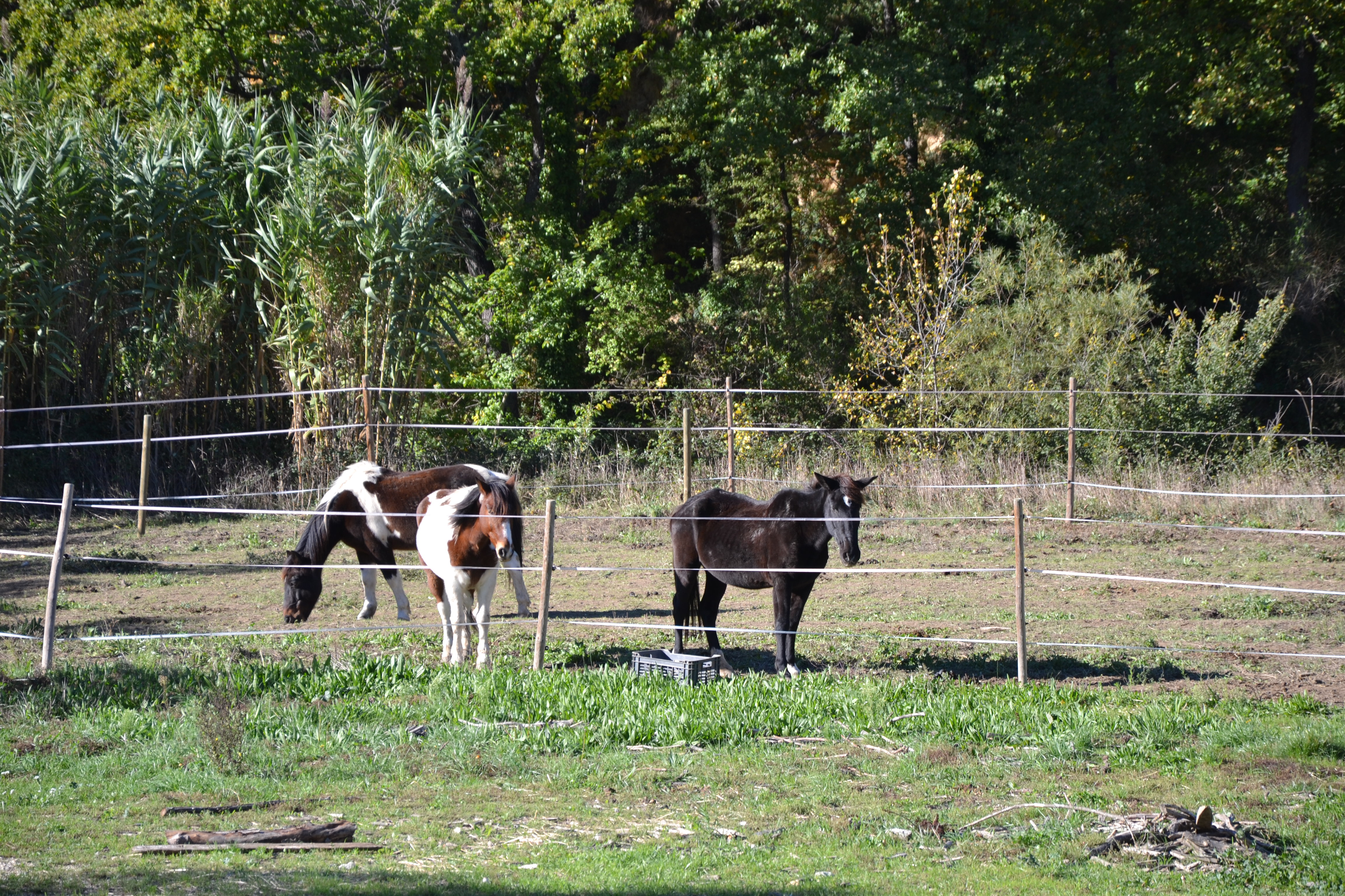 chevaux au pré près de Lafare